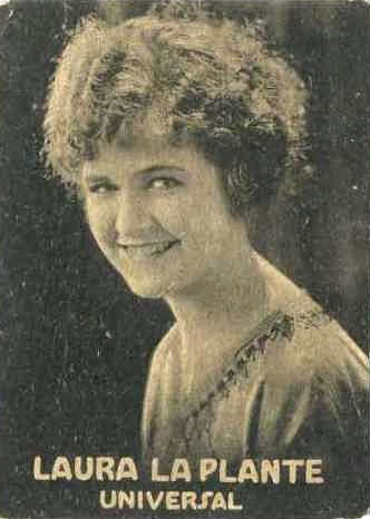 Laura La Plante - Susini y Bock Ovalados Tobacco Card